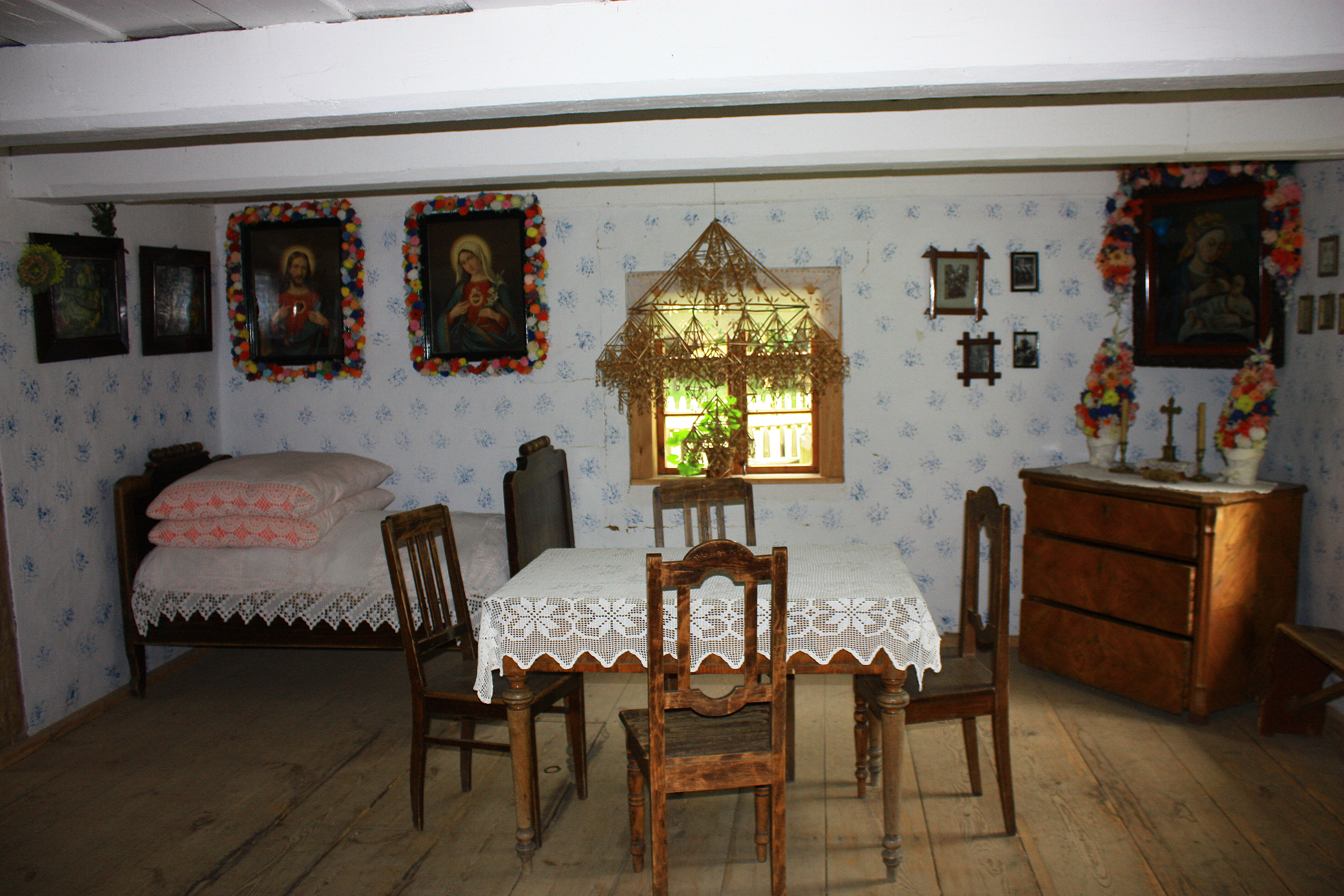 Toruń - Park Etnograficzny - chata bogatego chłopa, wnętrze